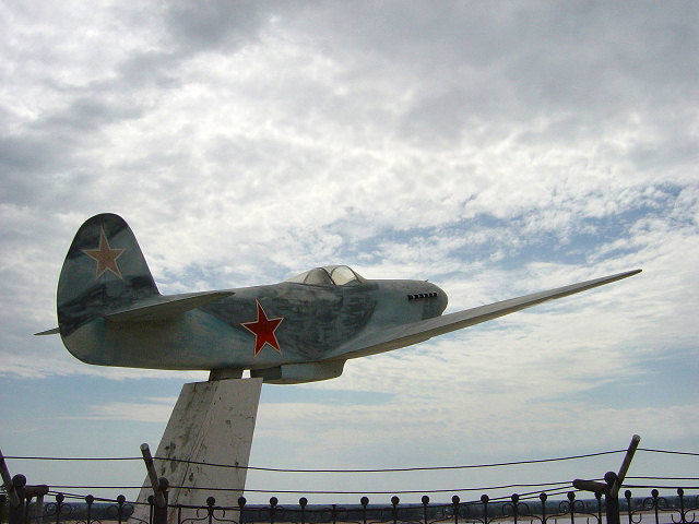 Volgograd: vliegtuig uit WO II. Eigen foto Mark Voorendt, juli 2005.